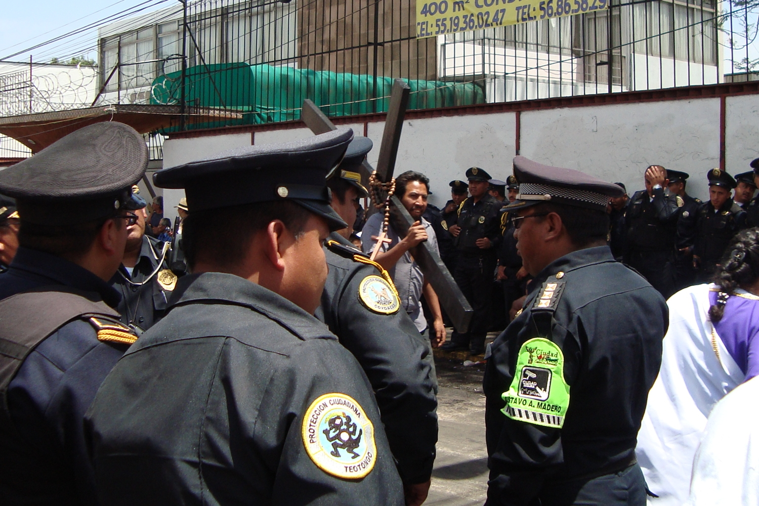 Cada año la Secretaría de Seguridad Pública del Distrito Federal realiza un operativo de seguridad en Iztapalapa con motivo de la Semana Santa. El centro de Iztapalapa de Cuitláhuac recibe aproximadamente 2 millones de visitantes.